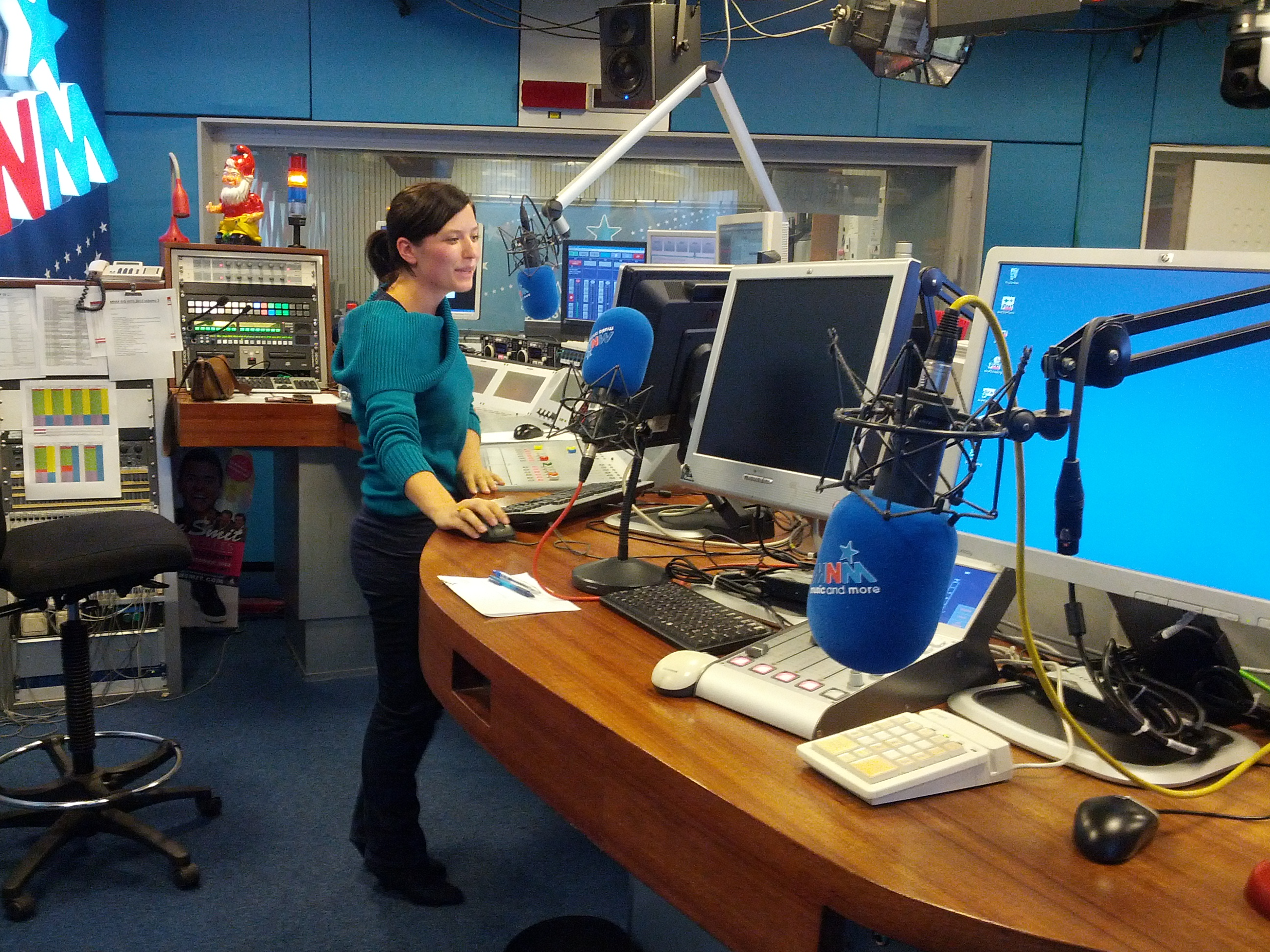 Astrid Demeure. Foto gemaakt in de MNM studio van Demeure.